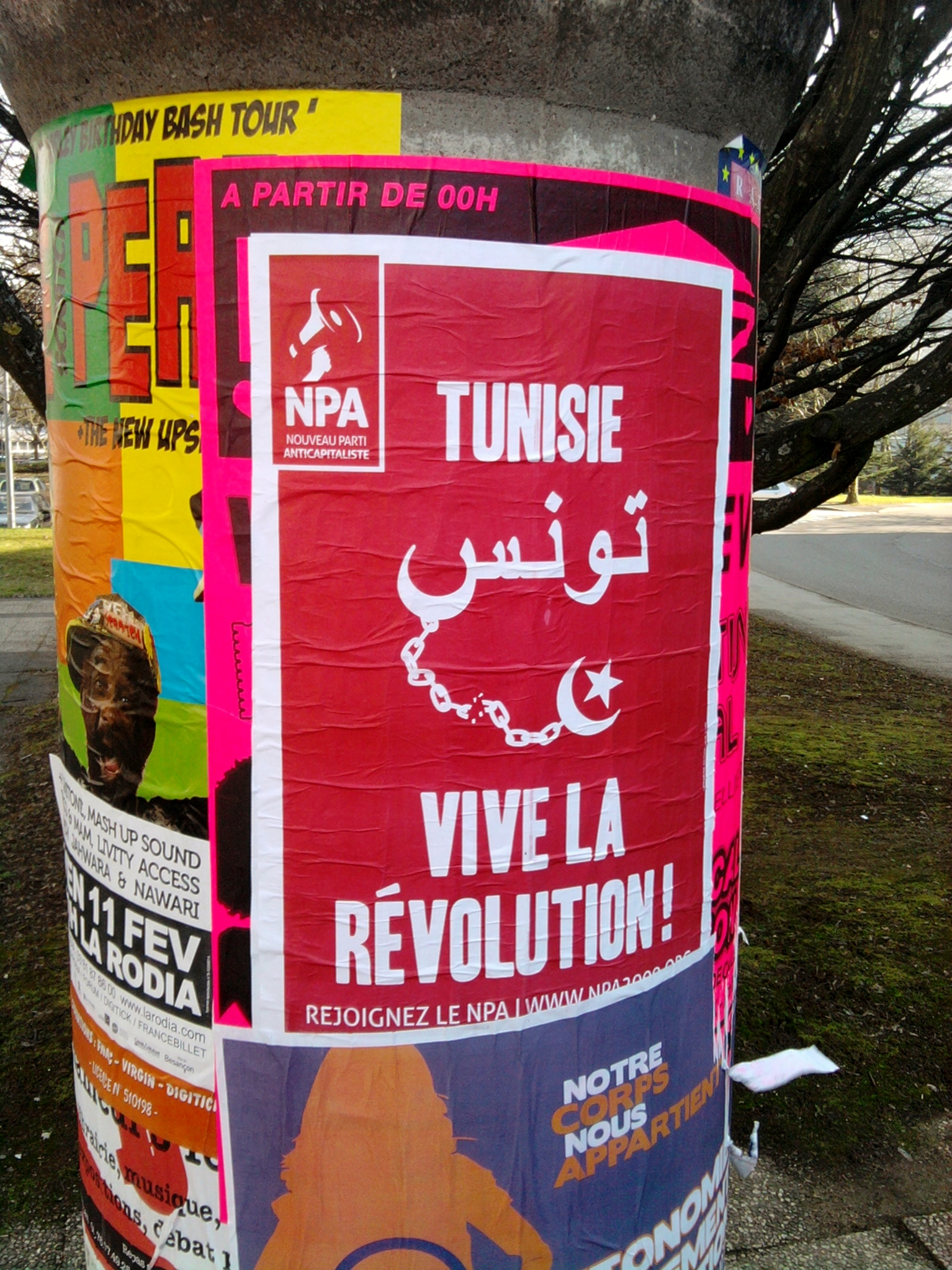 Affiche du NPA à propos de la Révolution tunsienne, à Besançon (Doubs, France).